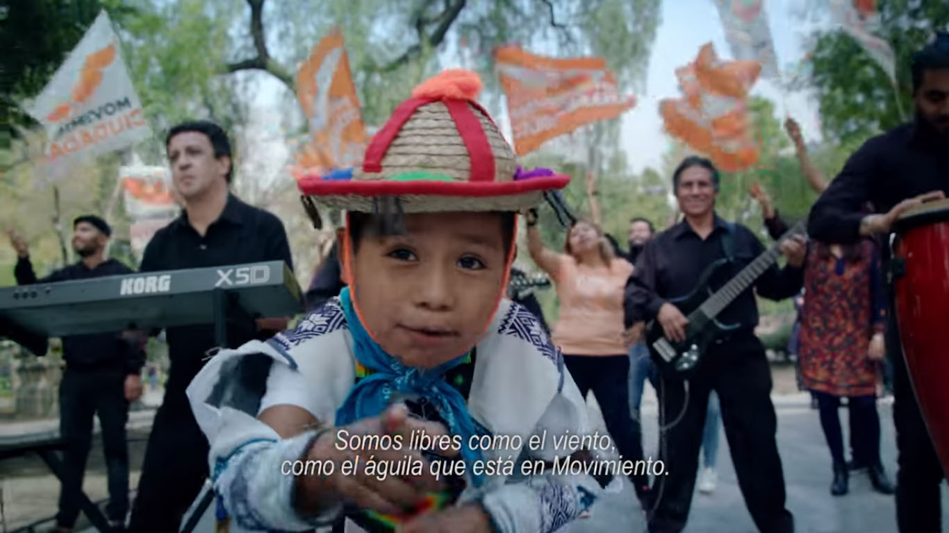 Yuawi López yotube Movimiento Ciudadano